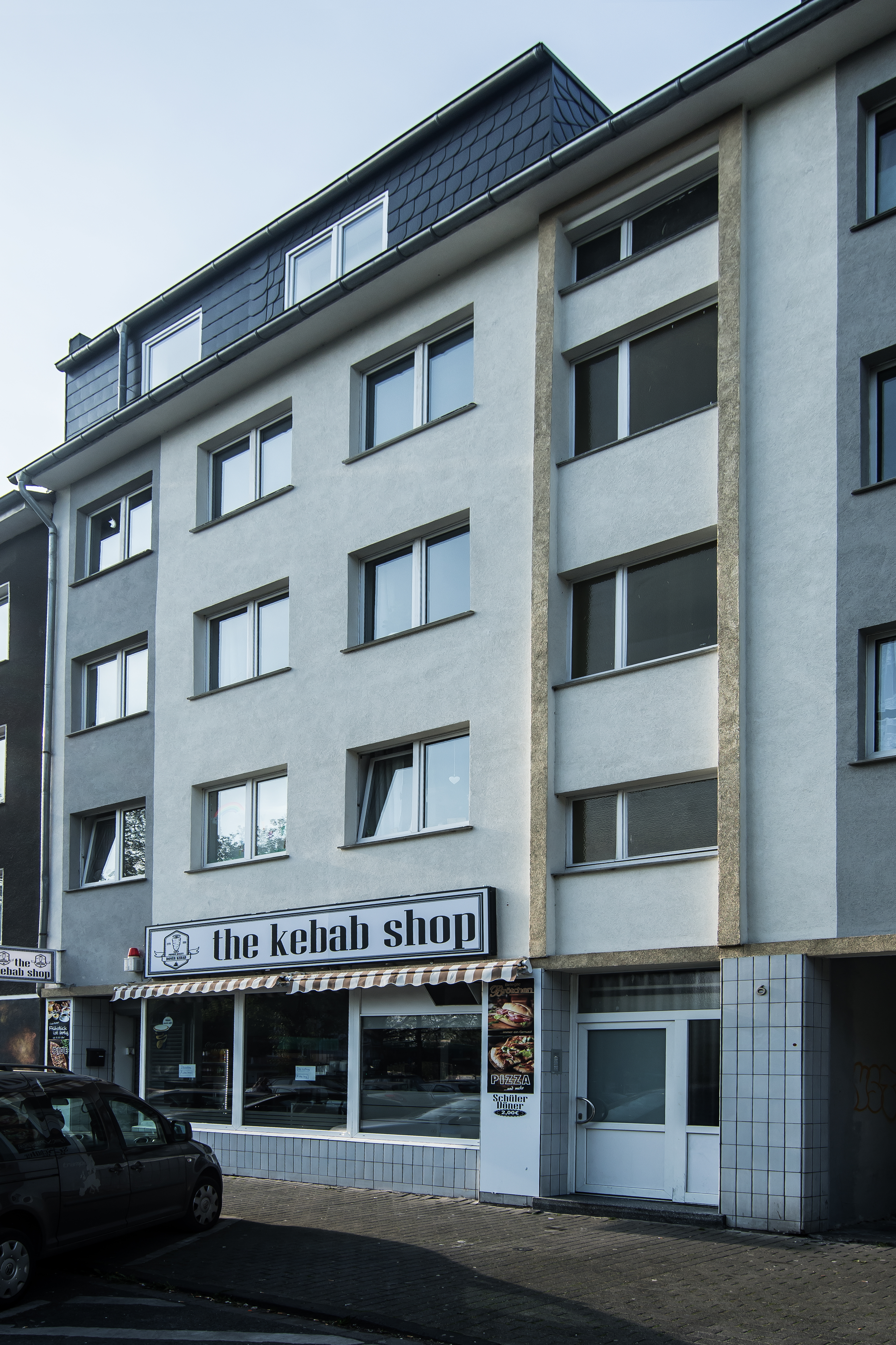 Stolpersteine und Wohnhaus von Jenny und Moritz Nußbaum